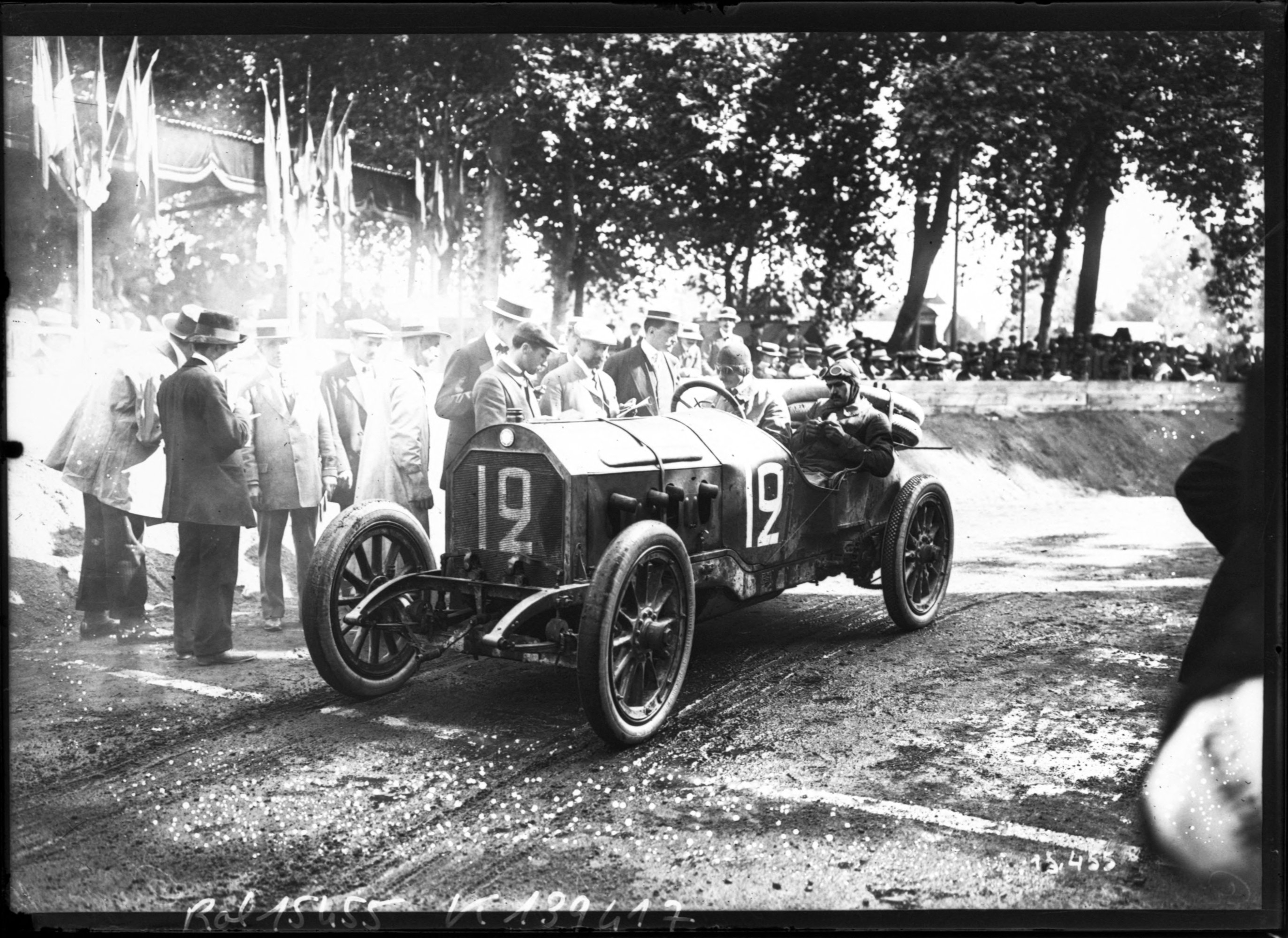 Circuit de la Sarthe 23/7/11, Deydier sur Cottin-Desgouttes [Grand Prix de France].